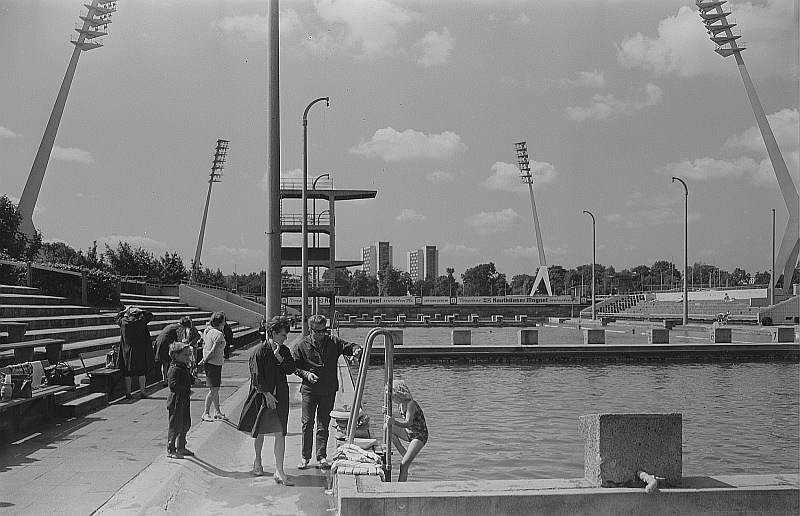 Original image description from the Deutsche FotothekDresden. Georg-Arnold-Bad